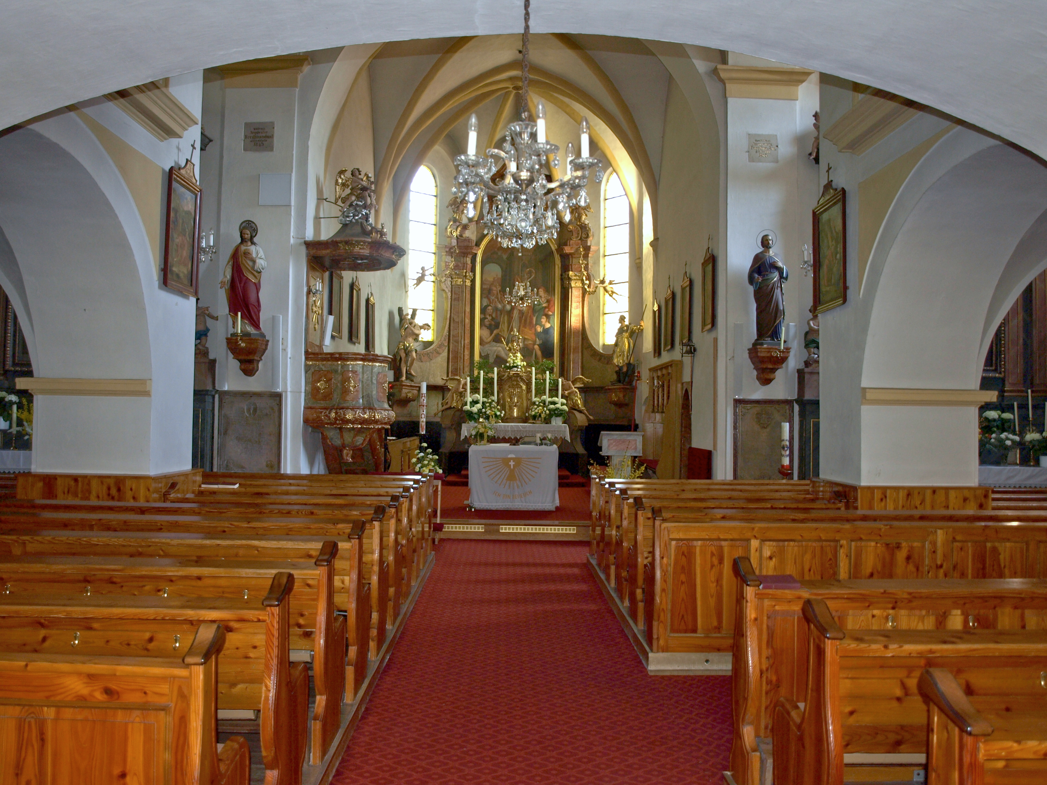 Kath. Pfarrkirche hl. Martin